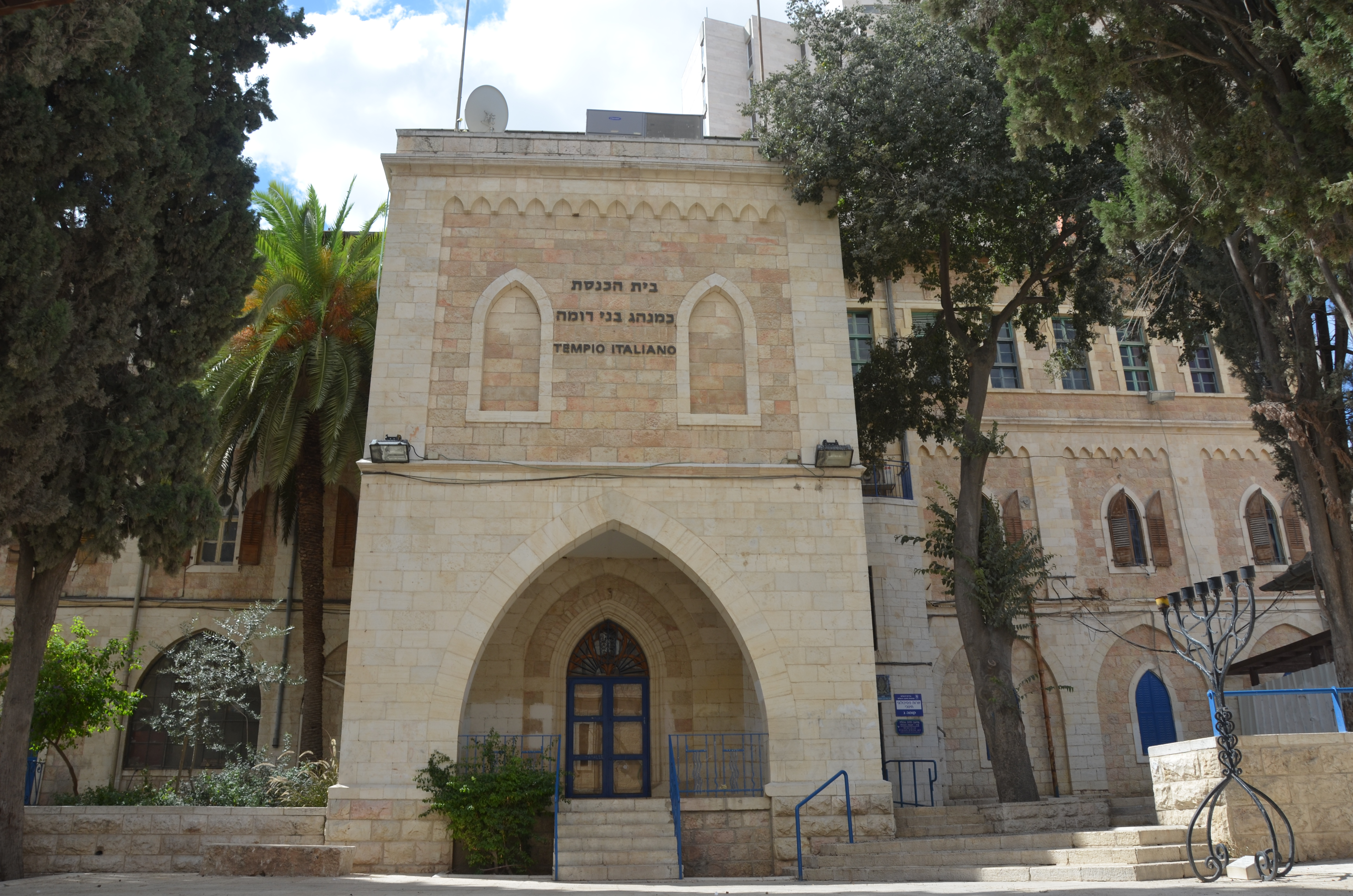 בית הספר שמידט או קולג' שמידט הוא מבנה בית ספר קתולי בירושלים, המשמש כיום את מוזיאון יהדות איטליה. המבנה מלבני ובעל שלוש קומות. החלק המרכזי (שתי קומות) שימש כקפלה המעוצבת בסימטריה בסגנון ניאו רנסנס. כיום המוזיאון כולל בתוכו את בית הכנסת של קונליאנו ונטו מ-1701, שהועבר בשלמותו מאיטליה לישראל.